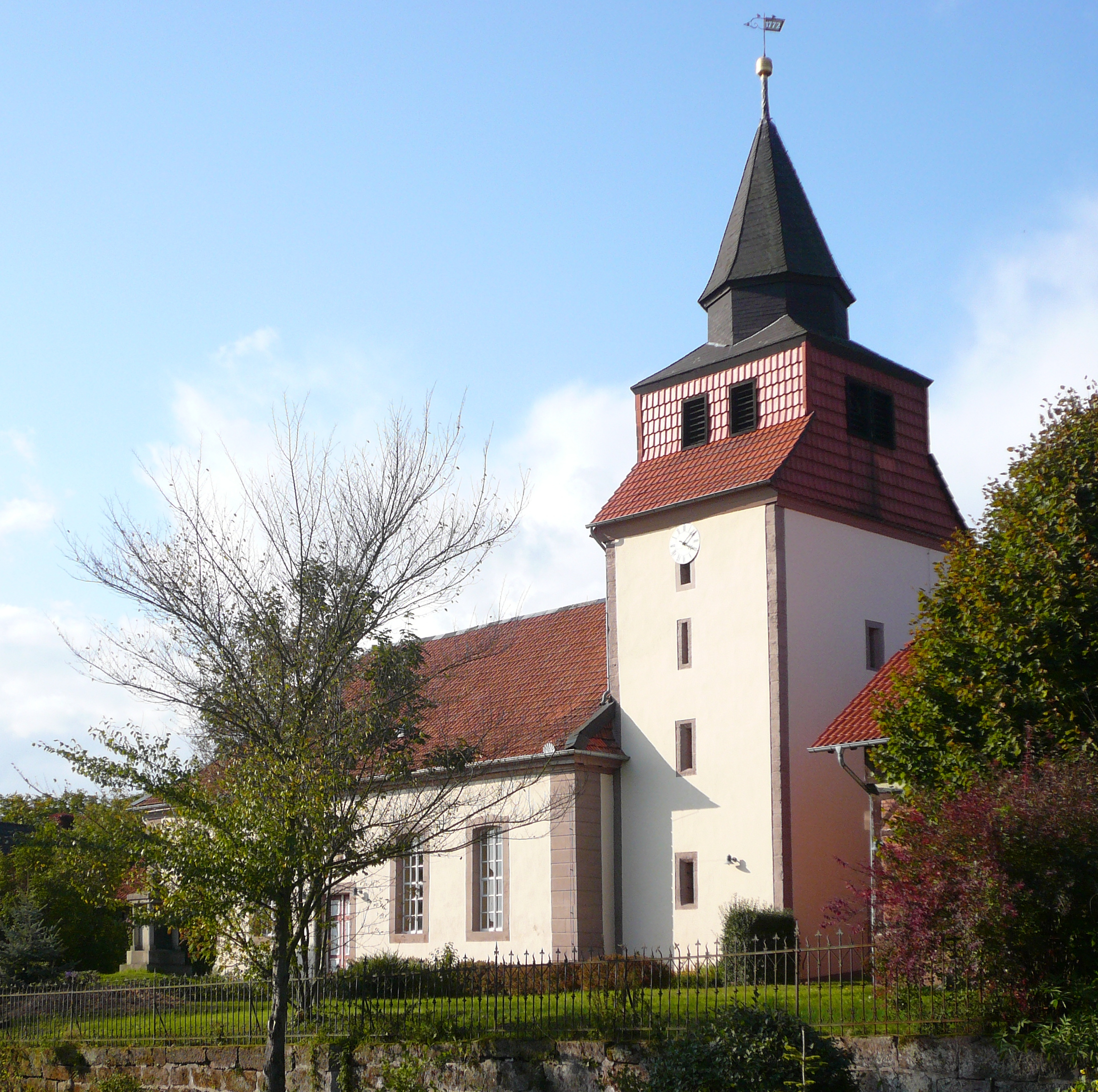 Ev.-ref. Kirche in Spanbeck, Flecken Bovenden, Niedersachsen. Turm im Kern mittelalterlich, Kirchensaal dat. 1772, Renovierung 1980–82